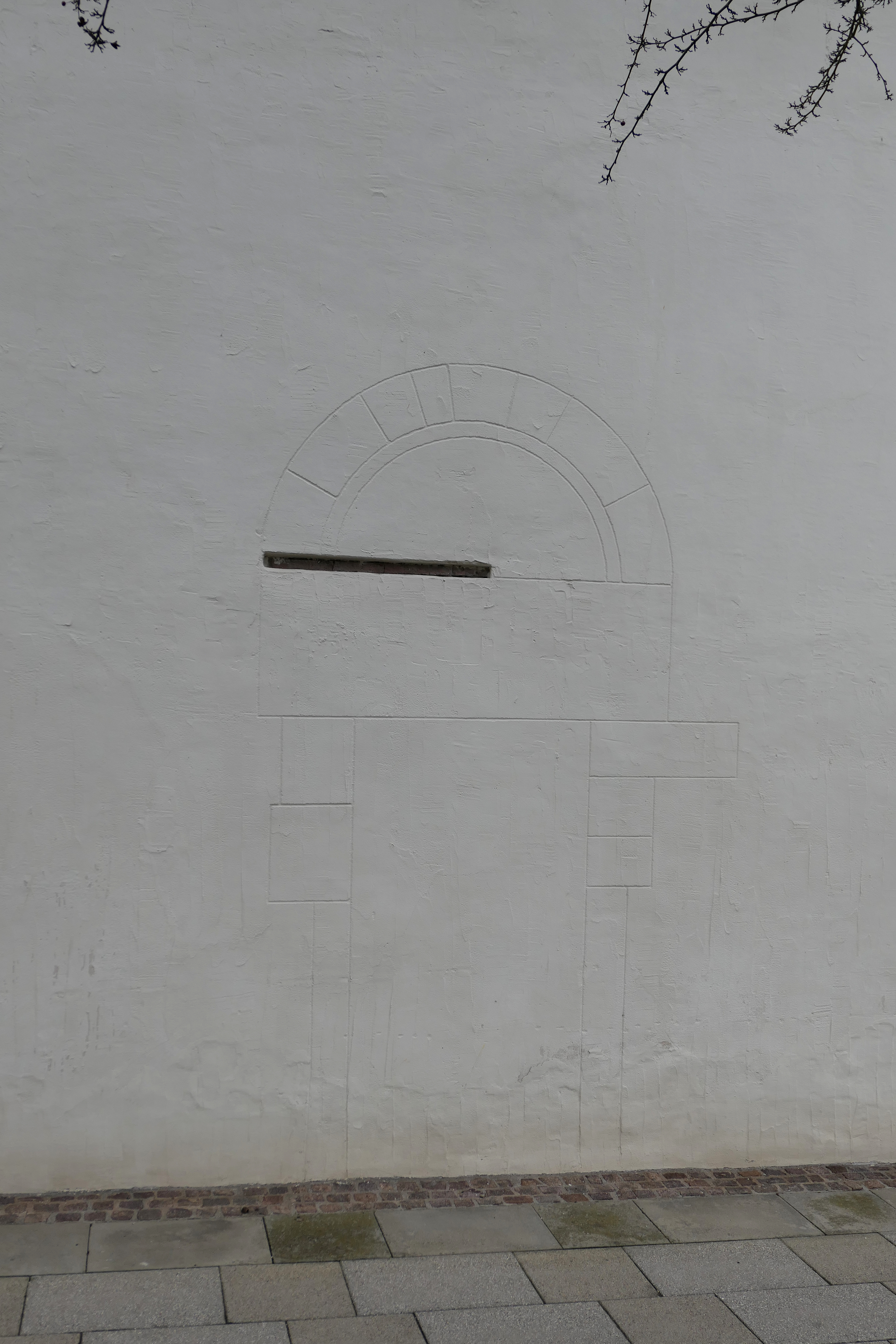 Bilfingen Wallfahrtkirche Johannes der Täufer Umriss Portal romanisch